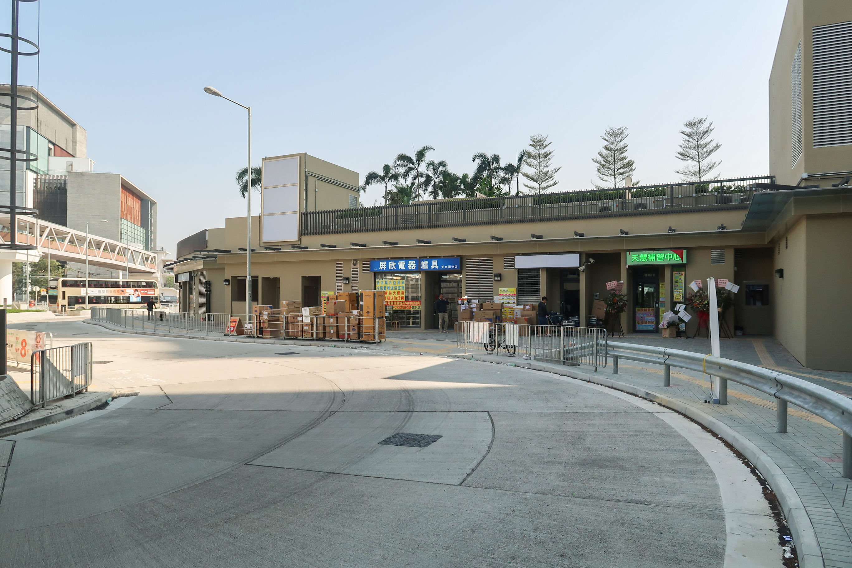 Ping Yan Shopping Centre shops